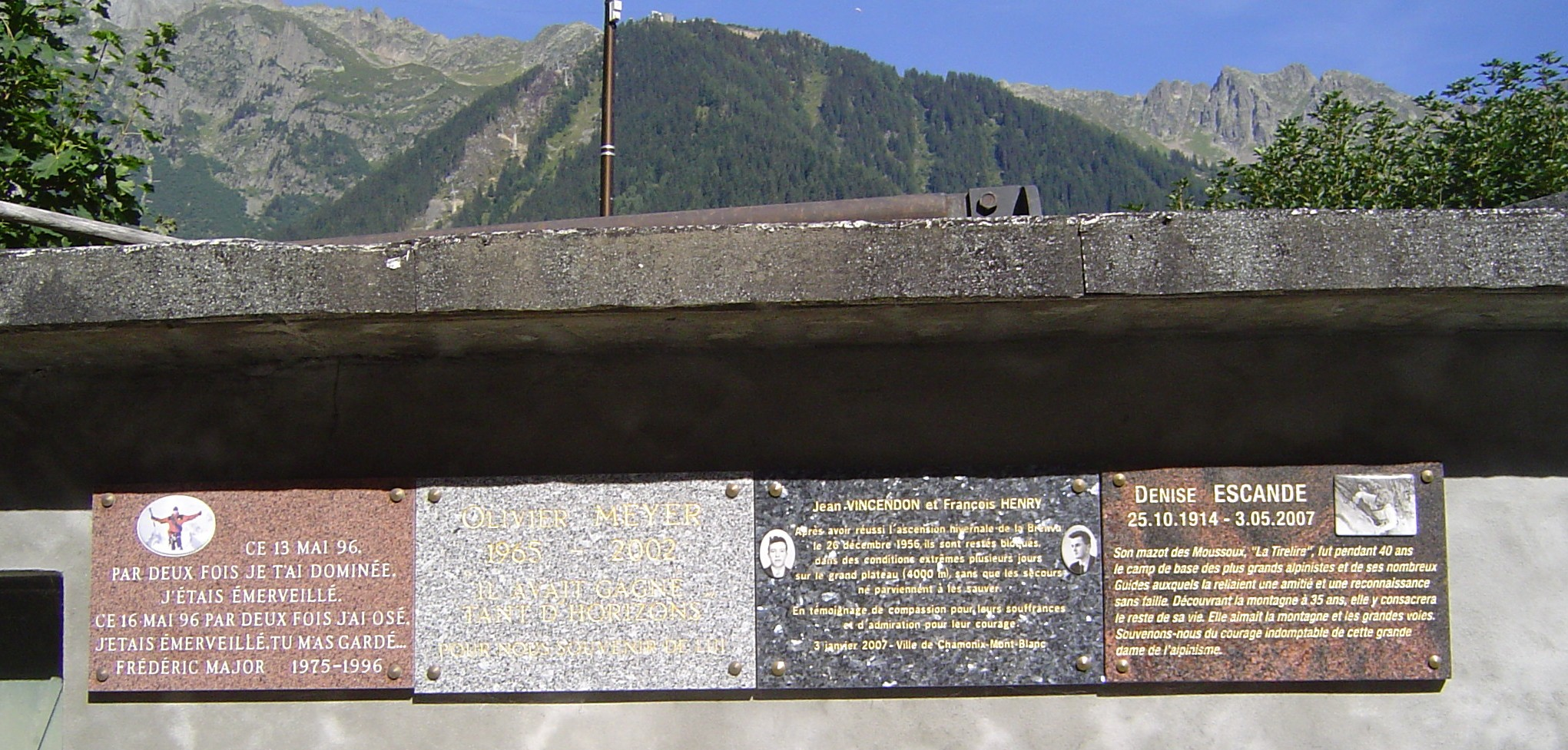 Photo prise au cimetière de Chamonix-Mont-Blanc (France)